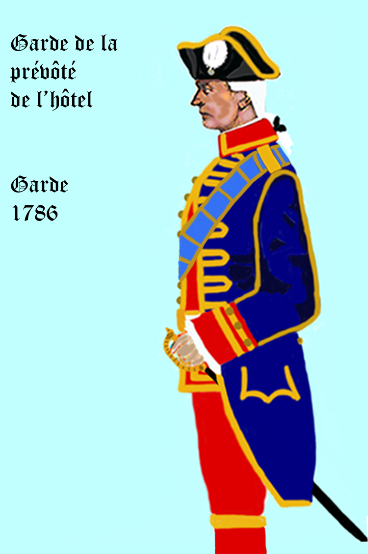 Uniform der Gardes de la prévôté (Hofdienst